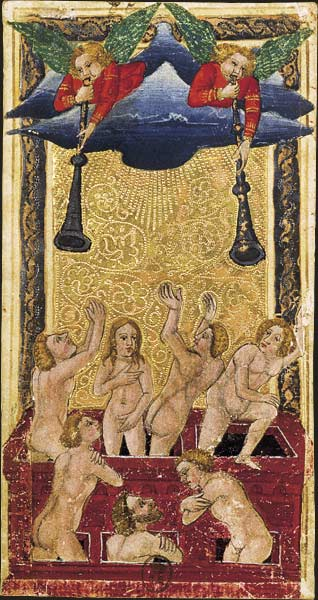 Charles VI (or Gringonneur) Deck; Le tarot dit de Charles VI